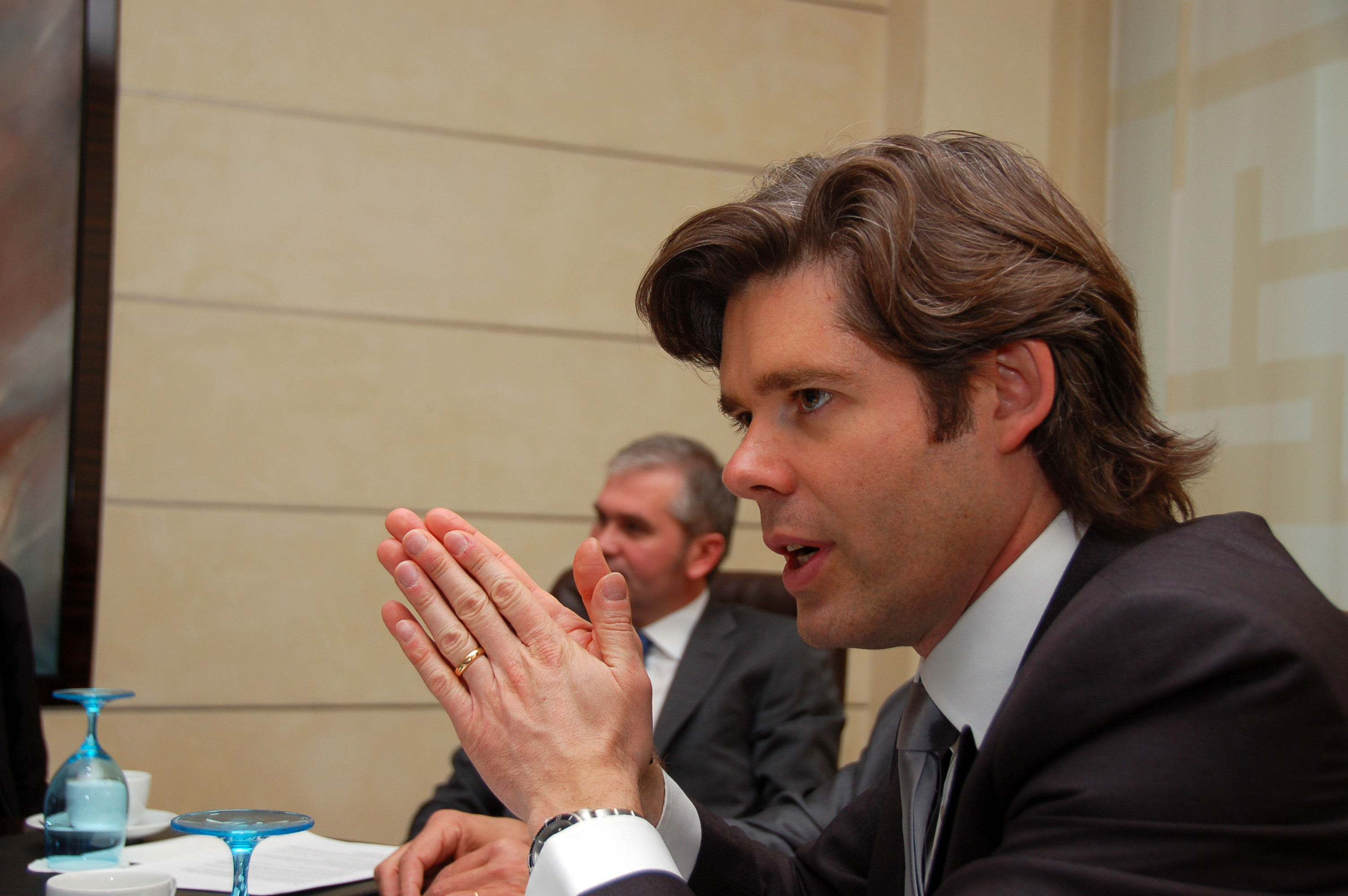 Pressekonferenz euronews im Hotel Intercontinental Michael Peters (Geschäftsführer und Vorstandsmitglied seit 2005)